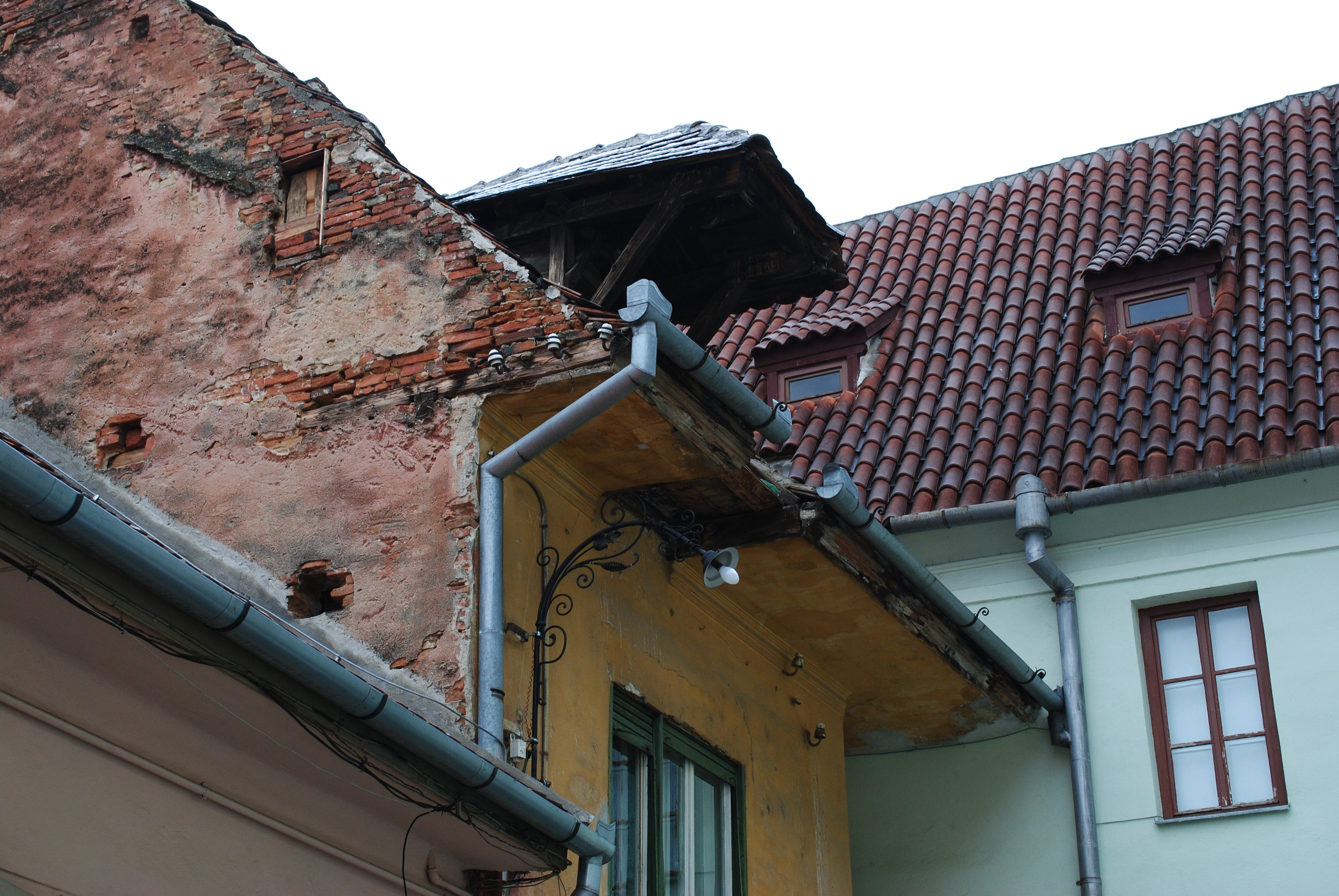 Casă, sec. XV - XVIII, sec. XX